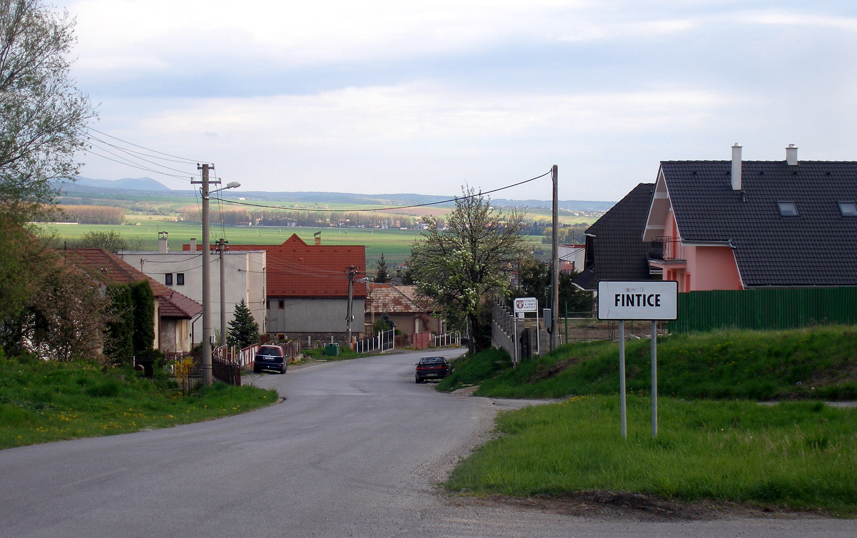 Obec Fintice okres Prešov región Šariš